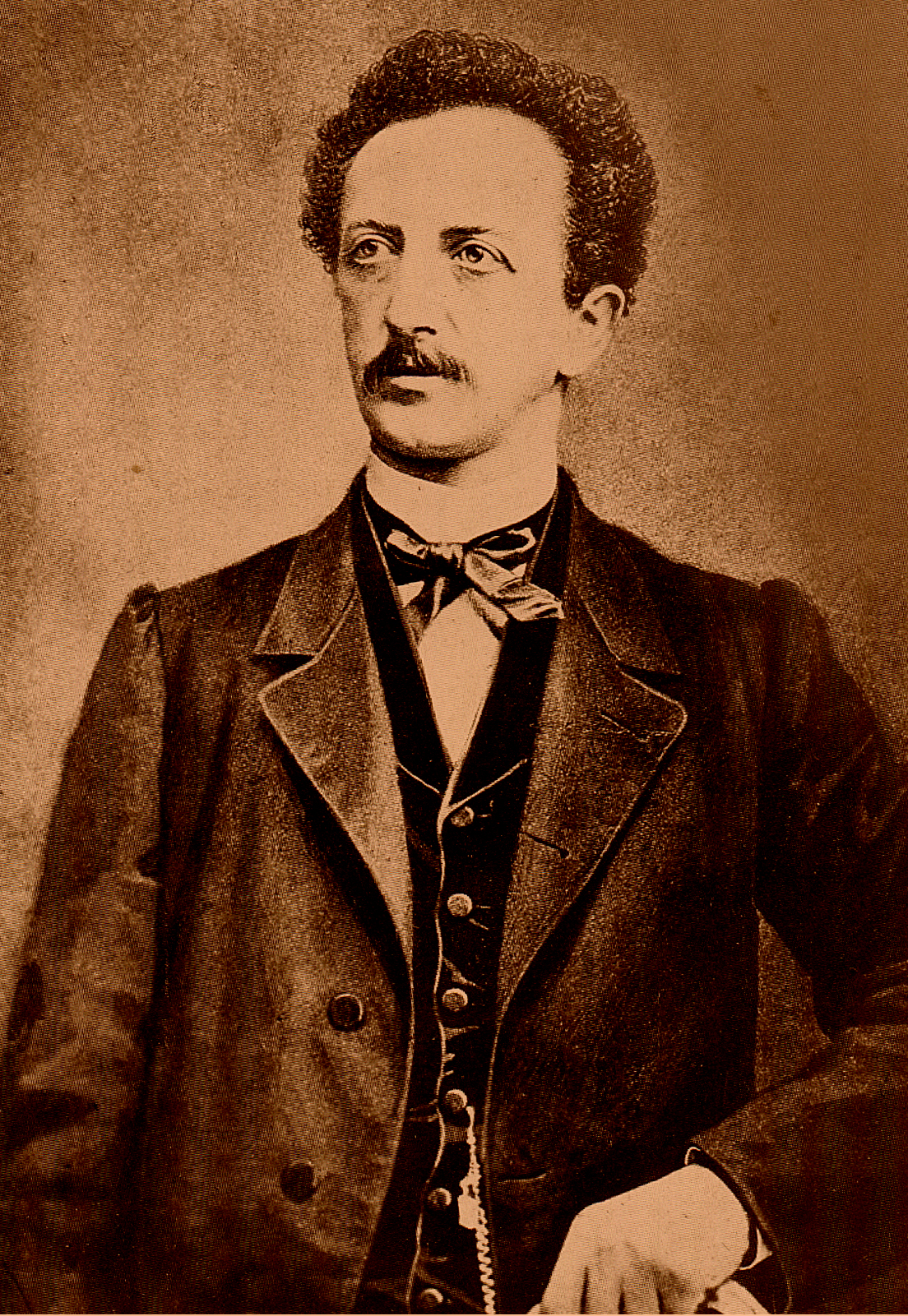 Фердинанд Лассаль. Ferdinand Lassalle